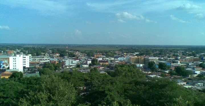 Vista de la zona central de Guanare